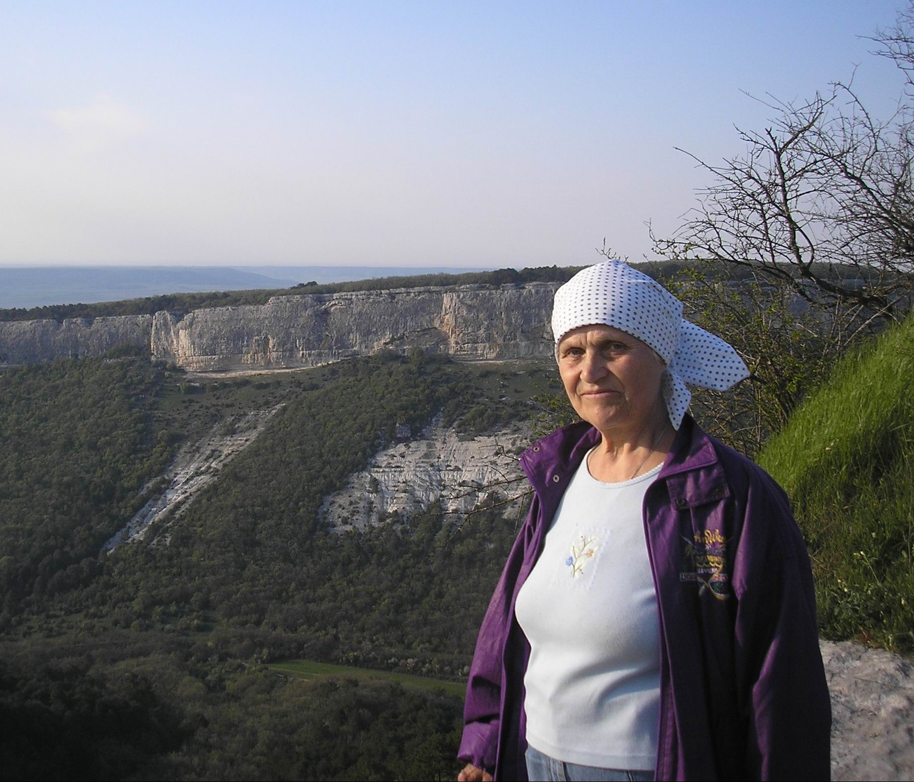 Анатоніна Іванівна Литвин - українська письменниця